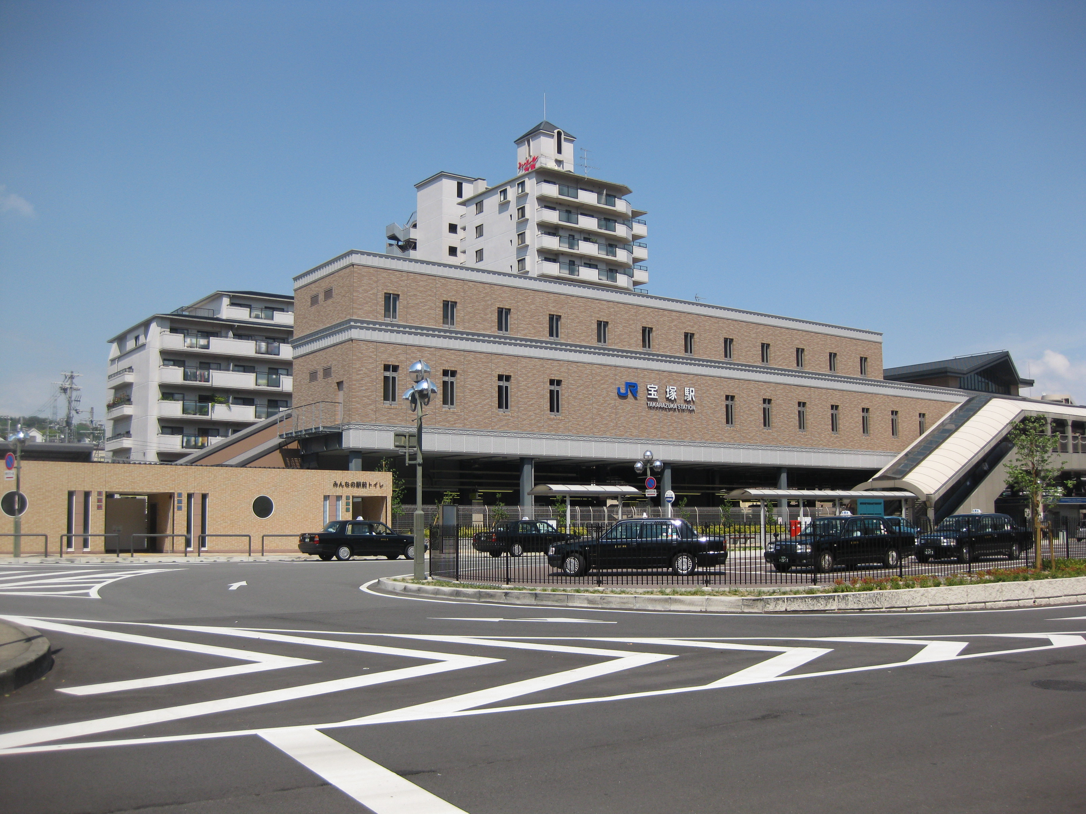 JR宝塚駅の駅舎。